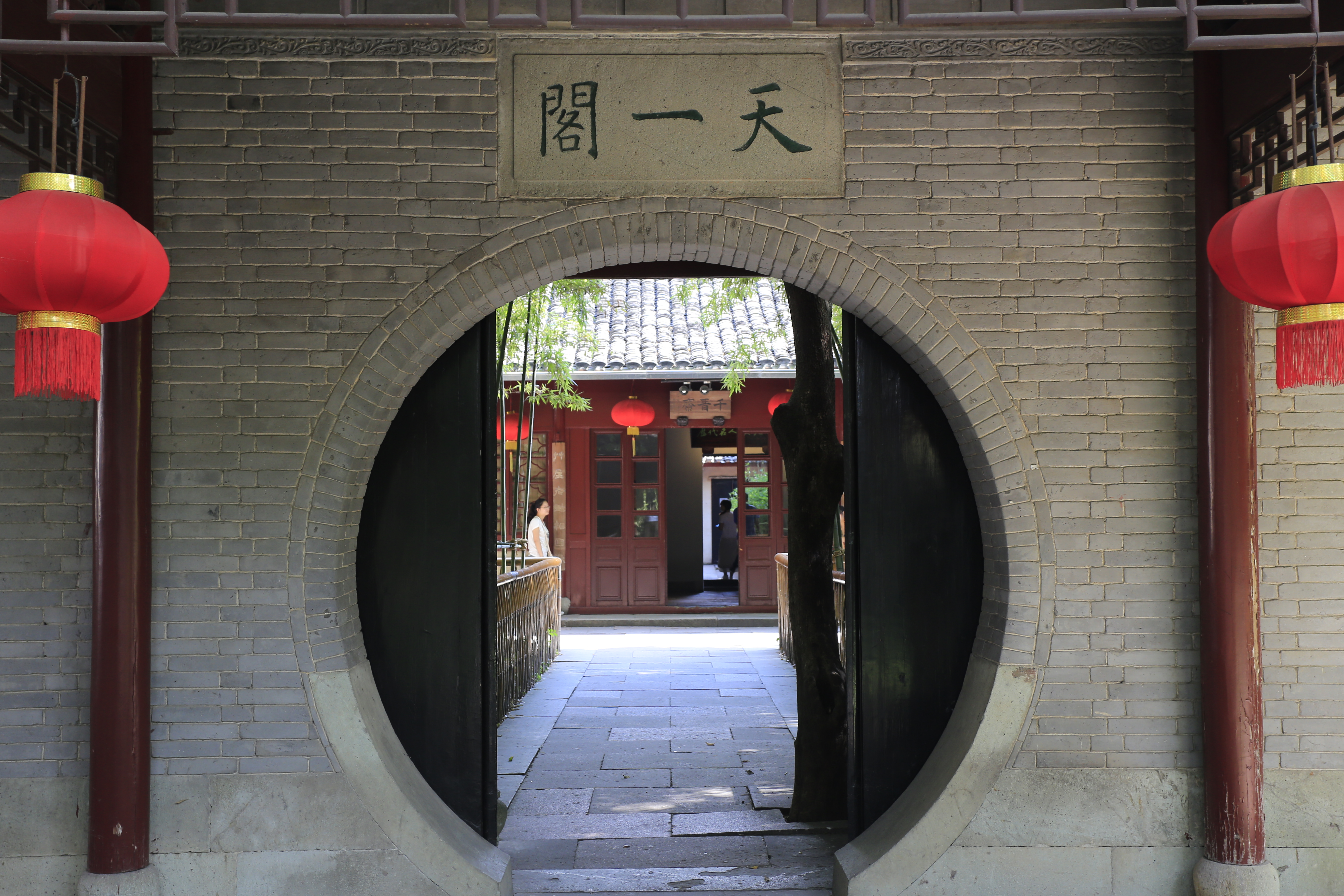 宁波天一阁 —— 千晋斋入口